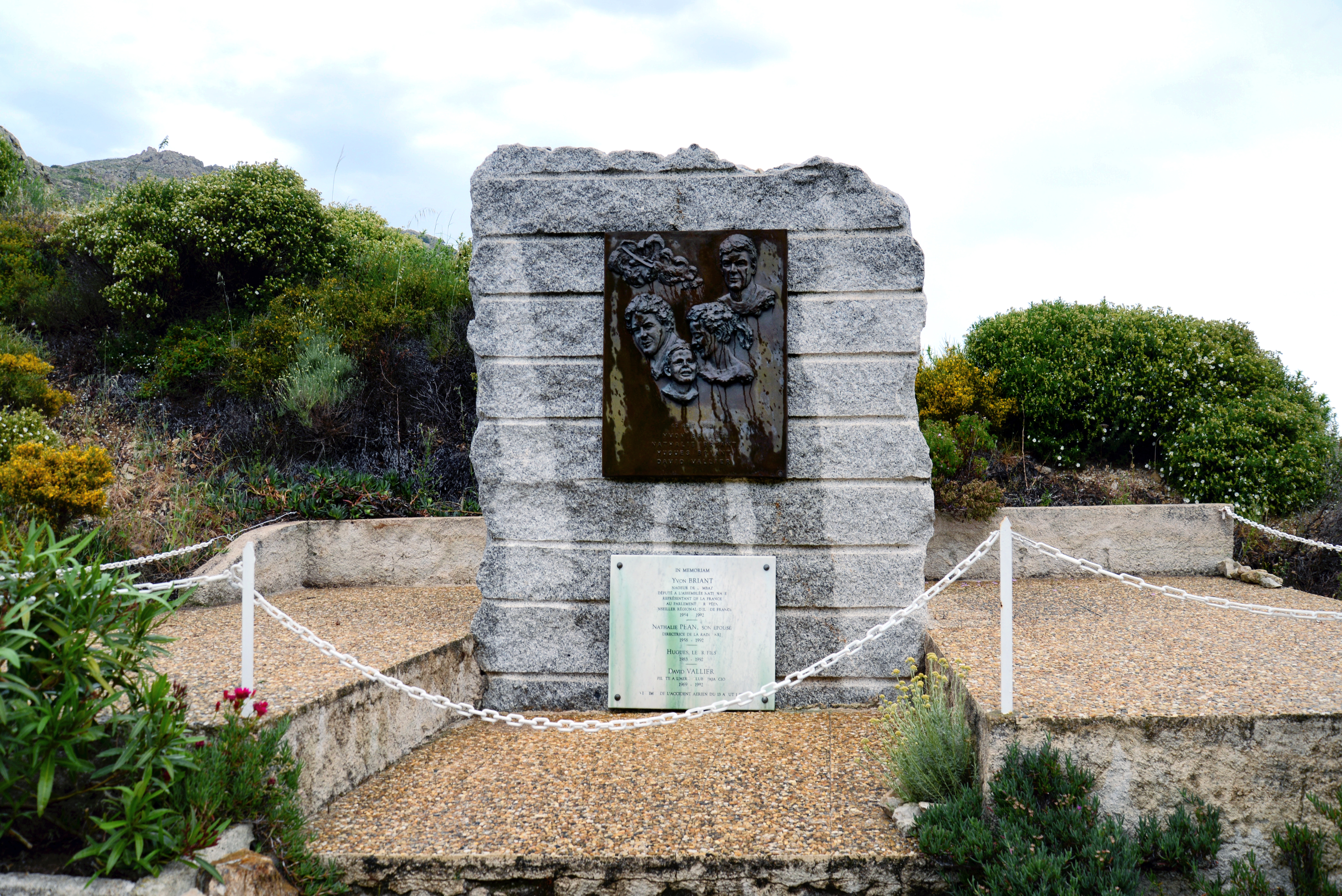 Calenzana, Balagne (Corse) - Mémorial Yvon Briant au col de Marsolino